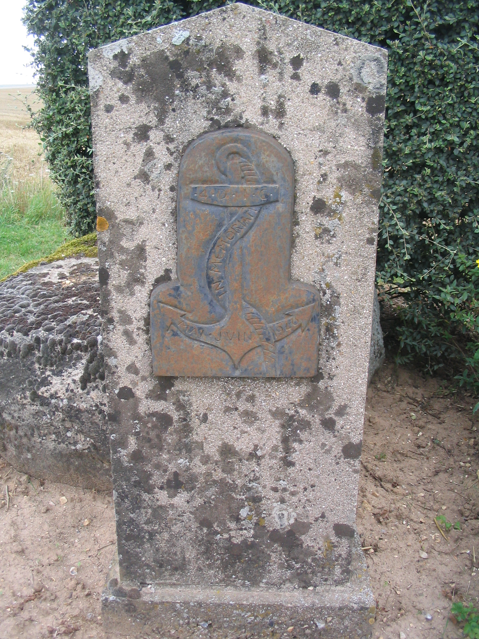 Borne située sur la commune de Plainval (Oise), au croisement de la D938 et de la route de la ferme de Lèvremont.